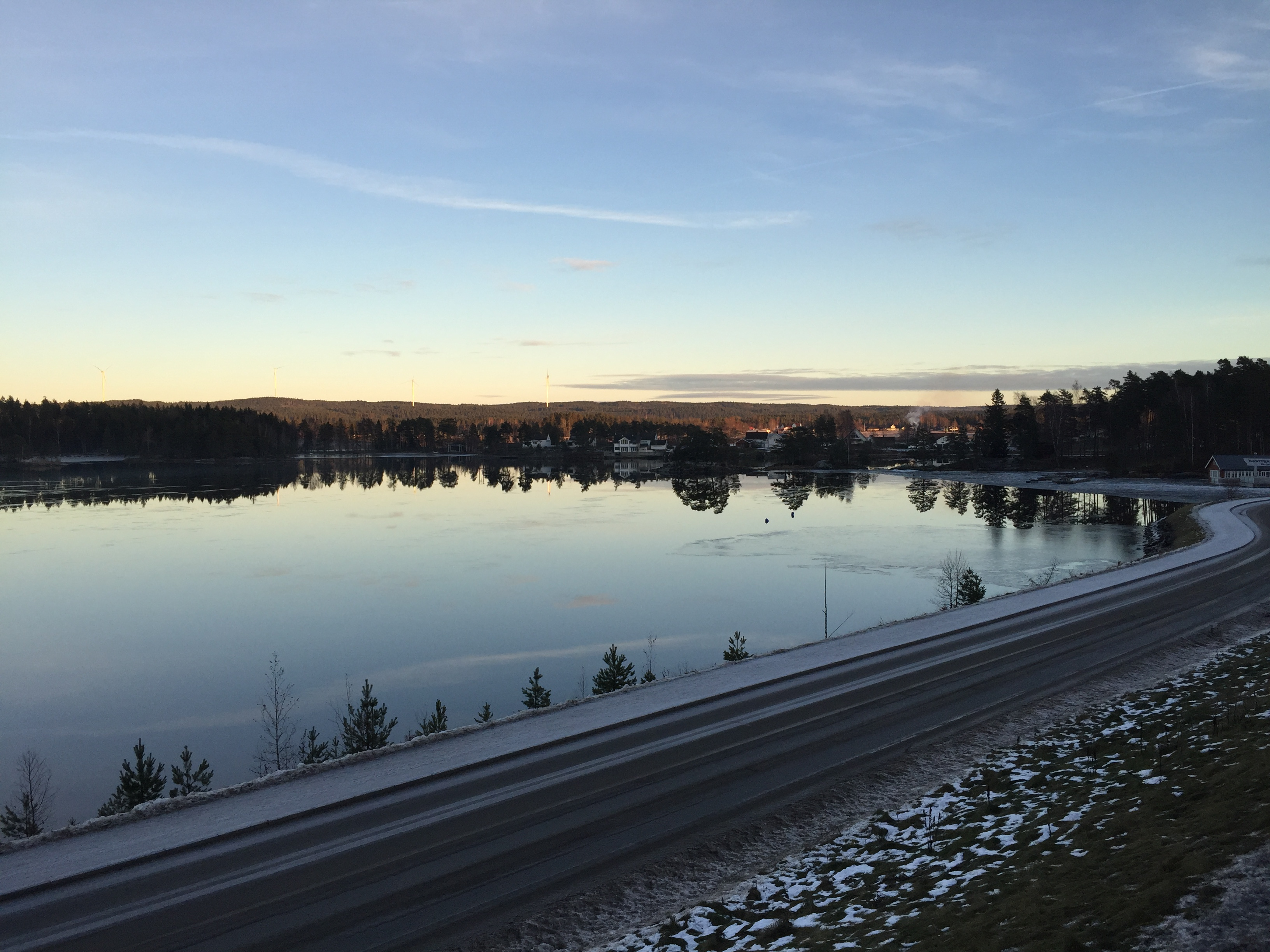 Rødenessjøen. Foto: Glenn Thomas Nilsen